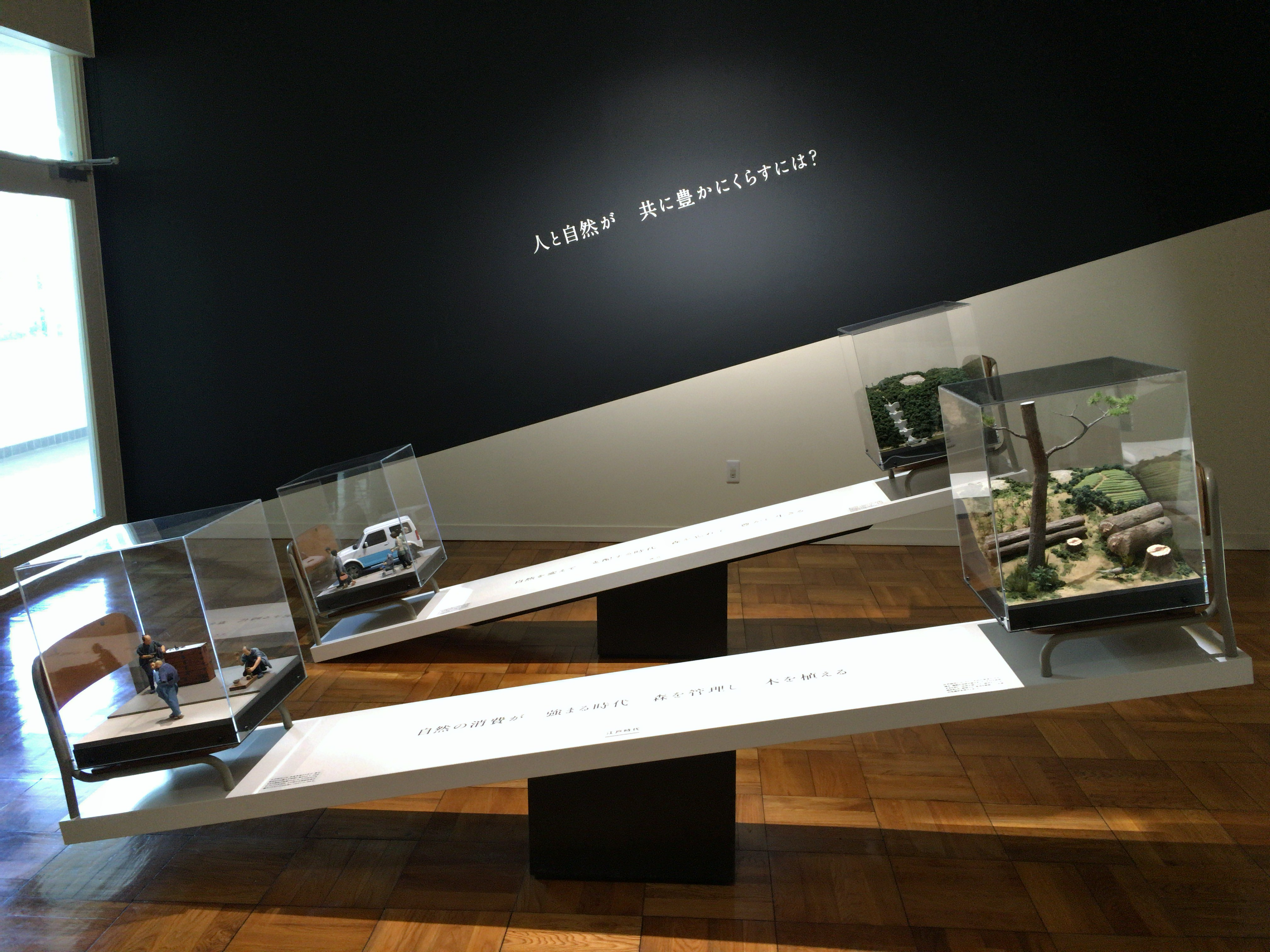 ふじのくに地球環境史ミュージアム(静岡県静岡市駿河区）展示室5